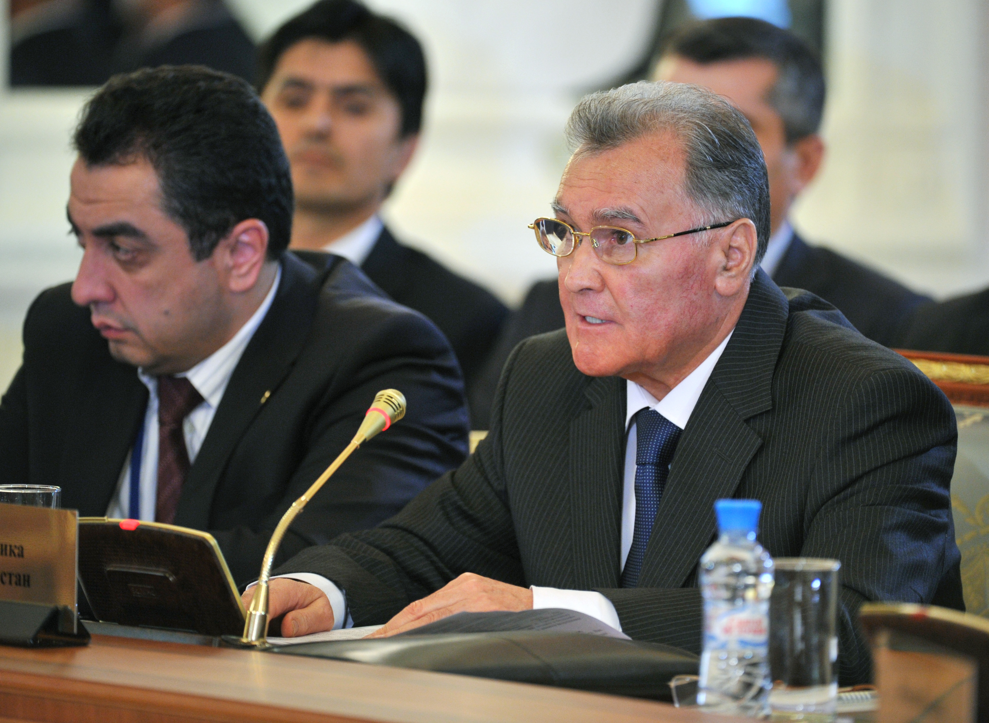 Премьер-министр Республики Таджикистан А. Г. Акилов на заседании Межгосударственного совета Евразийского экономического сообщества на уровне глав правительств